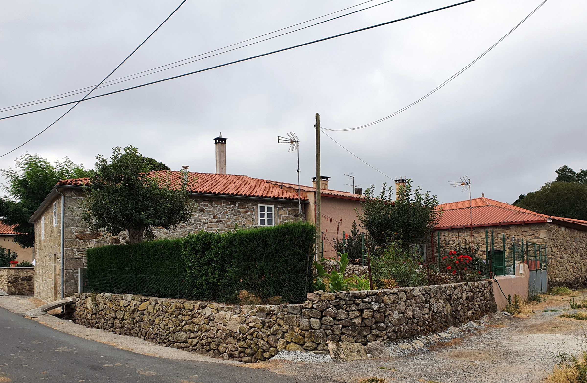 Lugar do Pazo, na parroquia de Dorra (Antas de Ulla). Dá gusto constatar que en ocasións as iniciativas persoais acometen as accións necesarias para o coidado do entorno, da vivenda e dos anexos ás mesmas. Sería moi de agradecer que esa iniciativa particular viñese acompañada da iniciativa pública, que dictase e acometese as medidas necesarias para harmonizar eses coidados, eliminando na medida do posible a contaminación visual...